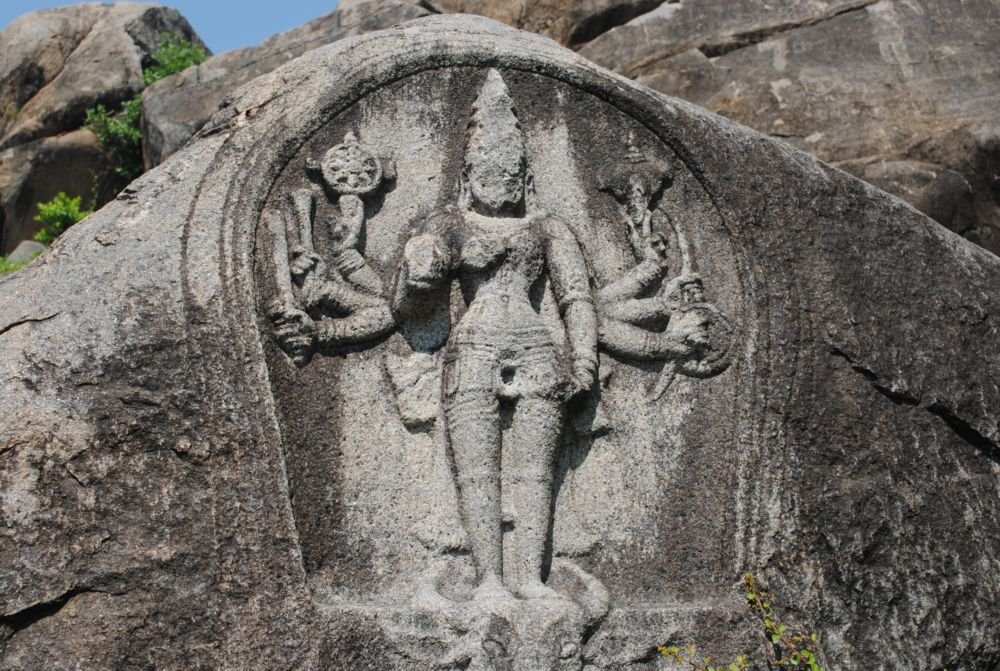 தச்சாம்பாடி சாலை ஓரம் உள்ள பாறை சிற்பம்